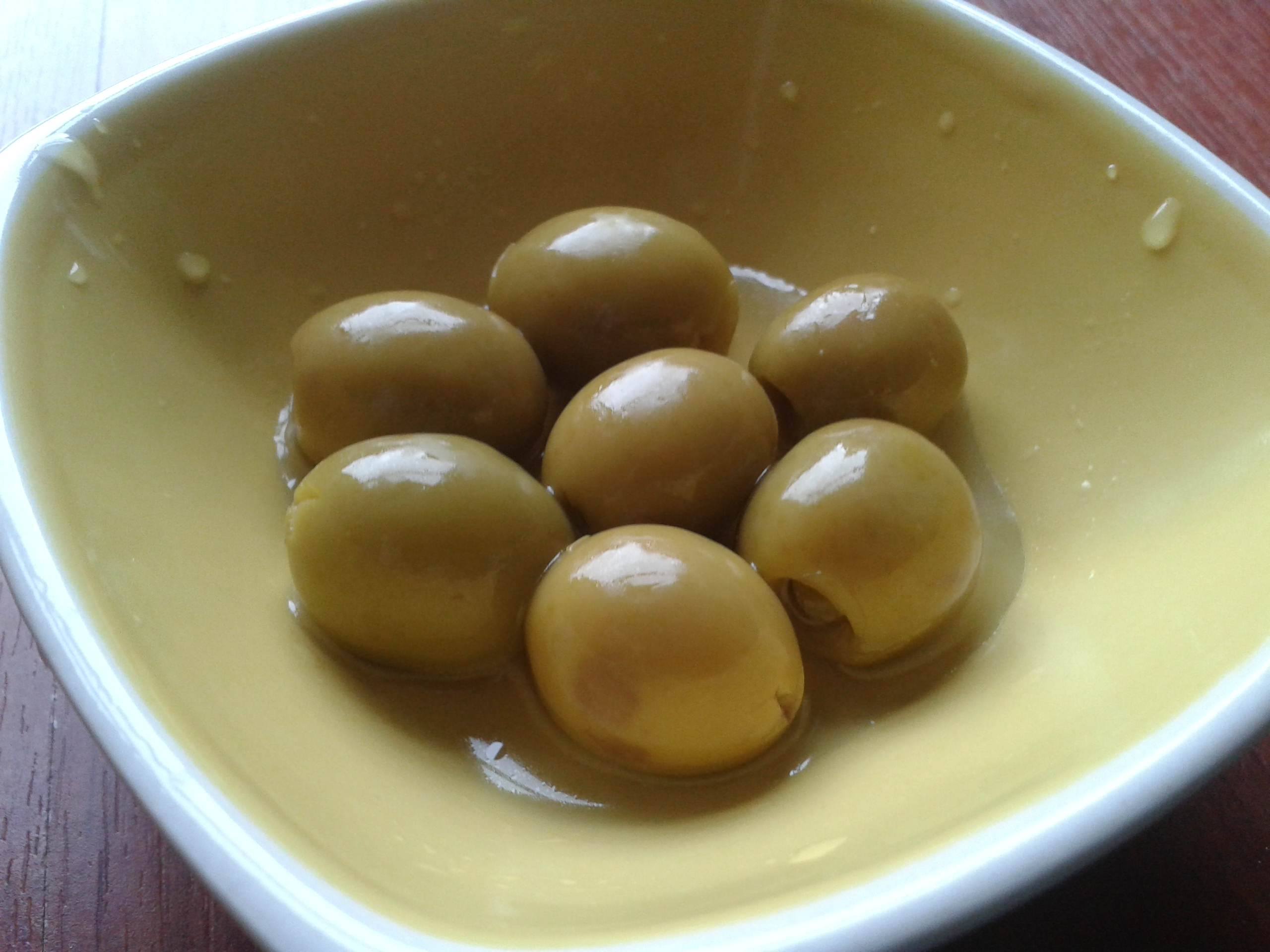 Esta imagen se corresponde a unas originales aceitunas sin anchoas servidas a modo de tentenpié en un cuenco amarillo.